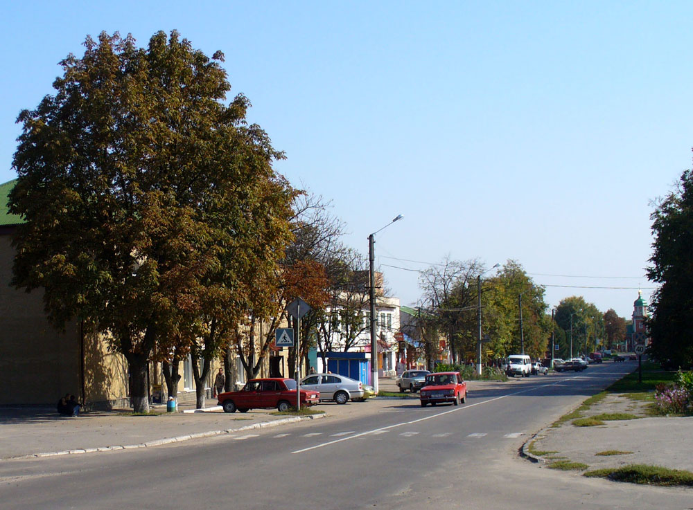 Leninstr. in der Stadt Chorol